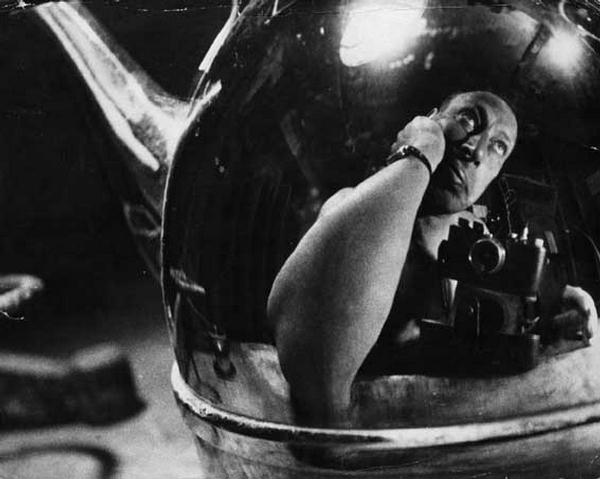 Автопортрет. Лангман, Елеазар Михайлович